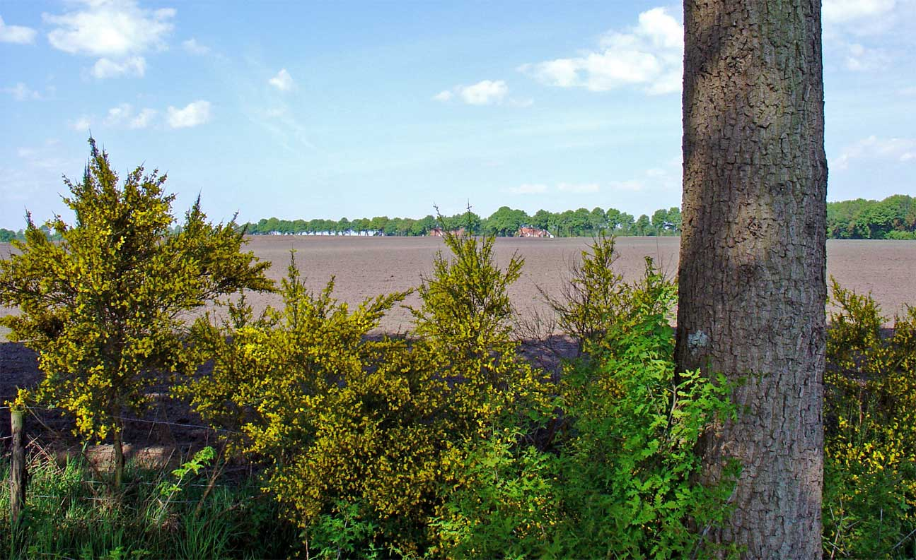 Zicht op de Hondsrug van Bronnegerveen in de richting van Drouwen